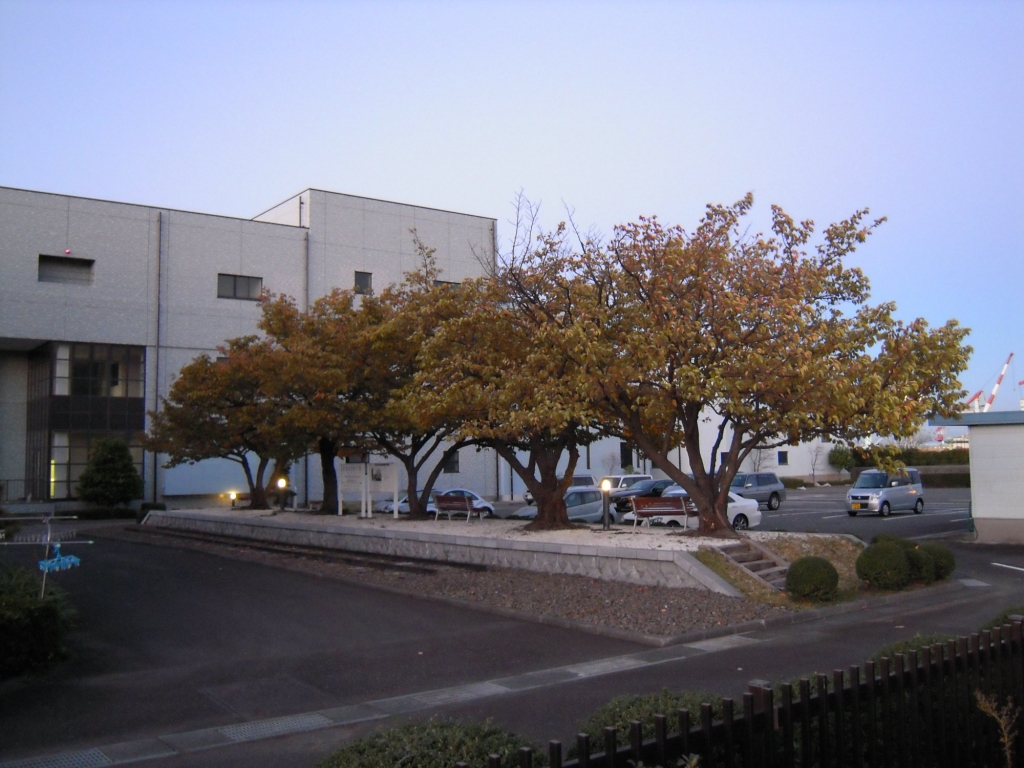 保存されているホーム（2014年11月）